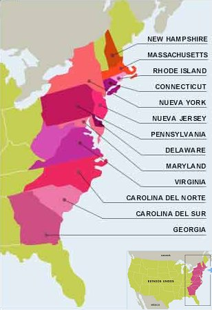 Mapa de las 13 colonias inglesas en América del Norte. Realizado por Educar Chile, un portal de recursos educativos libres sin reserva de copyright sostenido por el Gobierno de Chile.